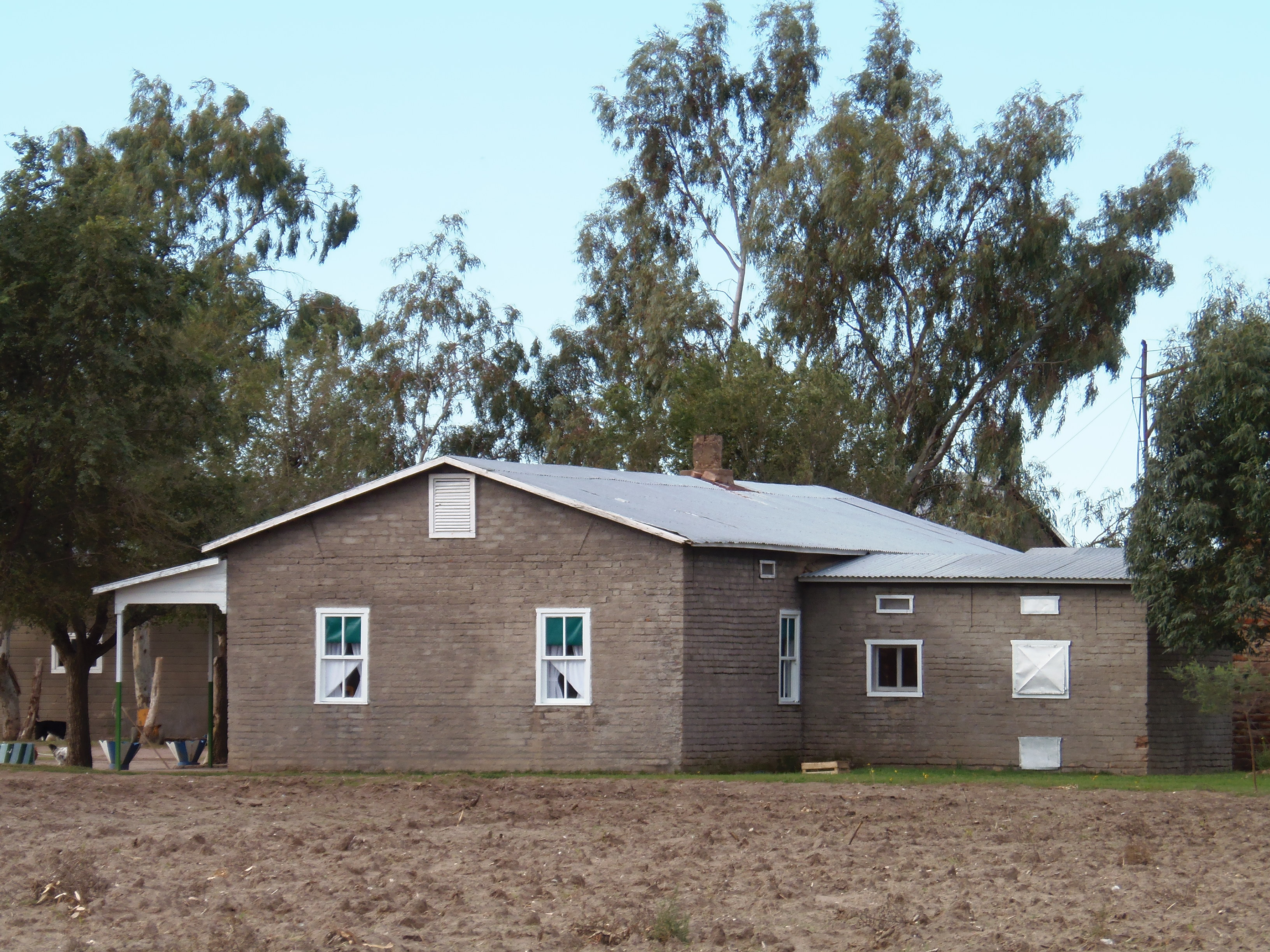 Tipica casa menonita.